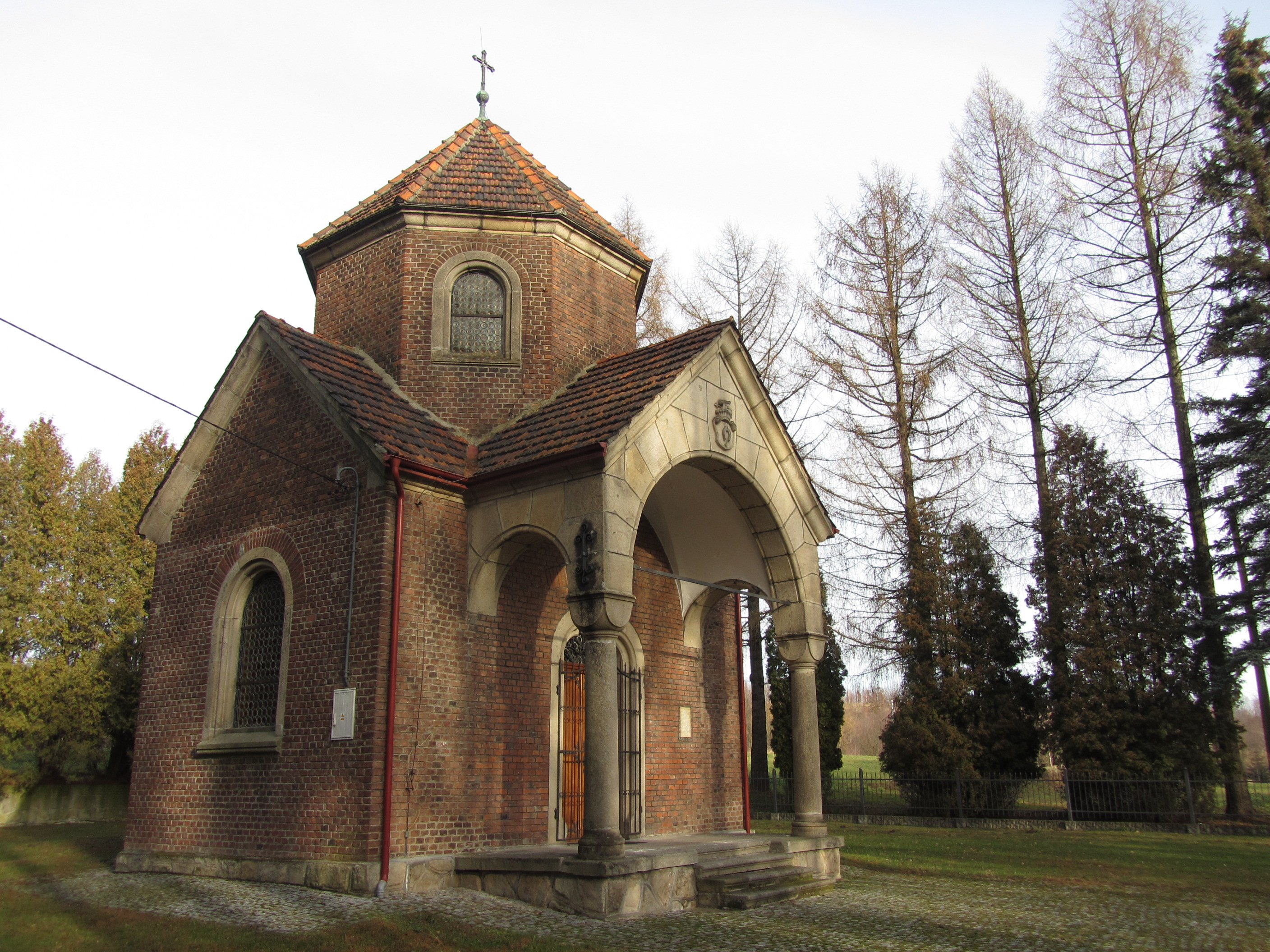 Wiśniowa, kaplica grobowa, XIX/XX